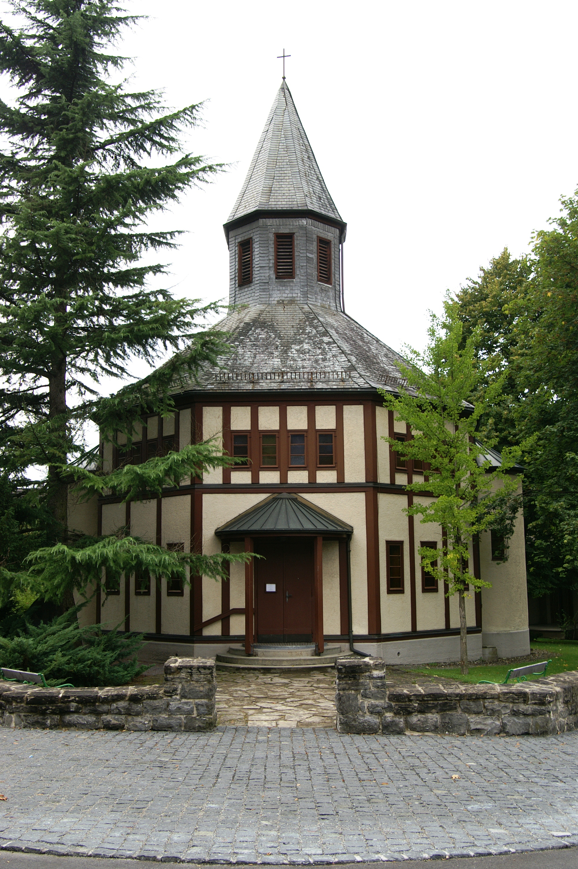 Evangelische Heilandskirche Dornbirn (1930 – 1931) Architekt: Otto Bartning im Stadtteil Dornbirn, Markt an der Rosenstrasse